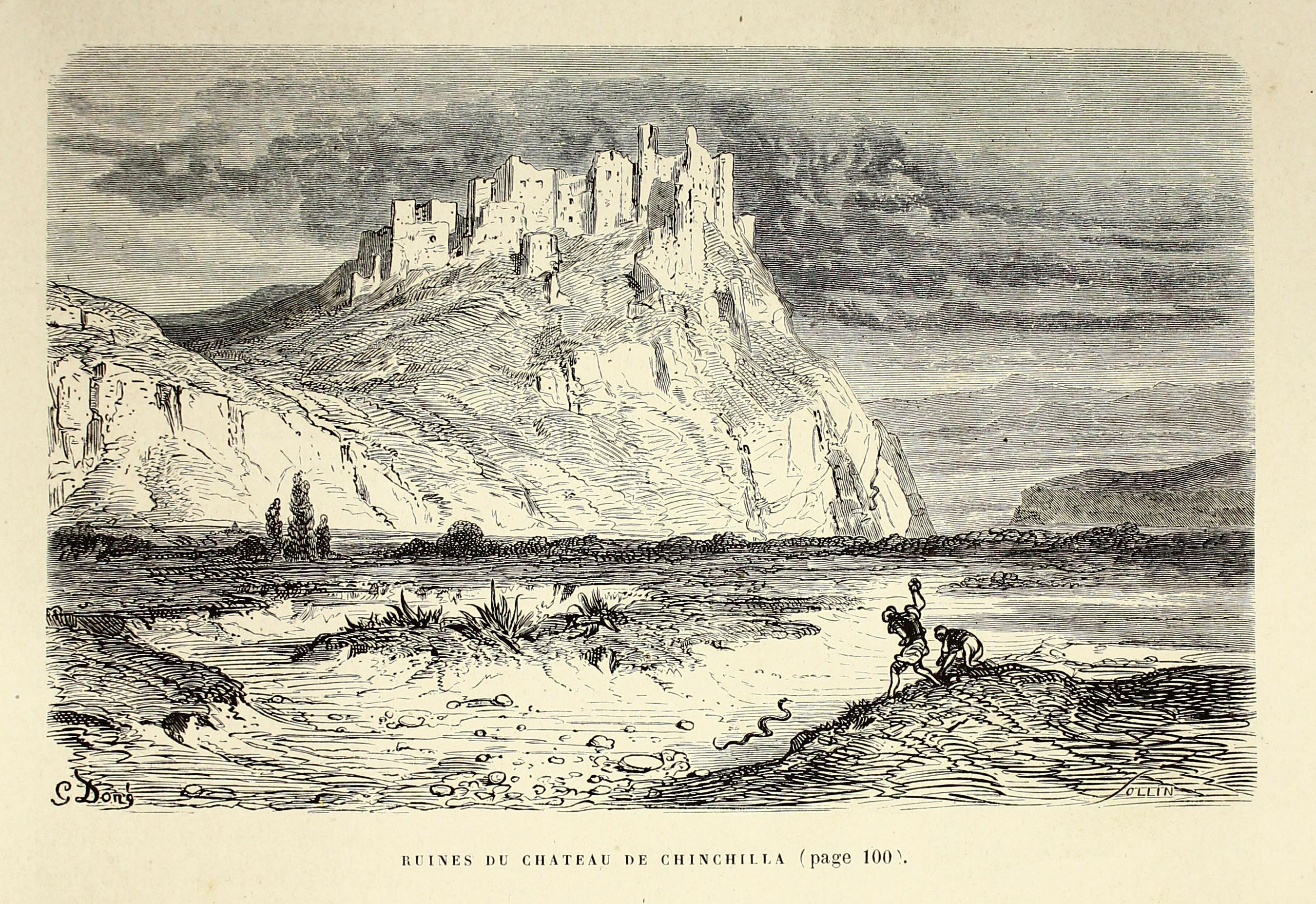 Autor: Davillier, Jean Charles, barón, 1823-1883 Descripción bibliográfica: L'Espagne / par Le Baron CH. Davillier ; ilustrée de 309 gravures dessinées su bois par Gustave Doré. - Paris : Librairie Hachette, 1874. - 799 p. : il. Materia: España- Geografía Materia: España- Usos y costumbres Ilustrador: Doré, Gustave, 1832-1883 Editor: Libreria Hachette Lugar de impresión: Francia, París Localización: Libro completo